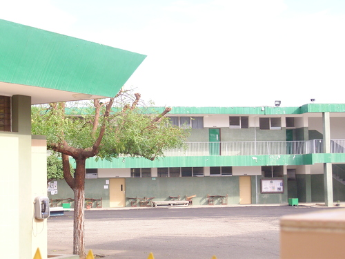 Uno de los primeros colegios de Ciudad Ojeda